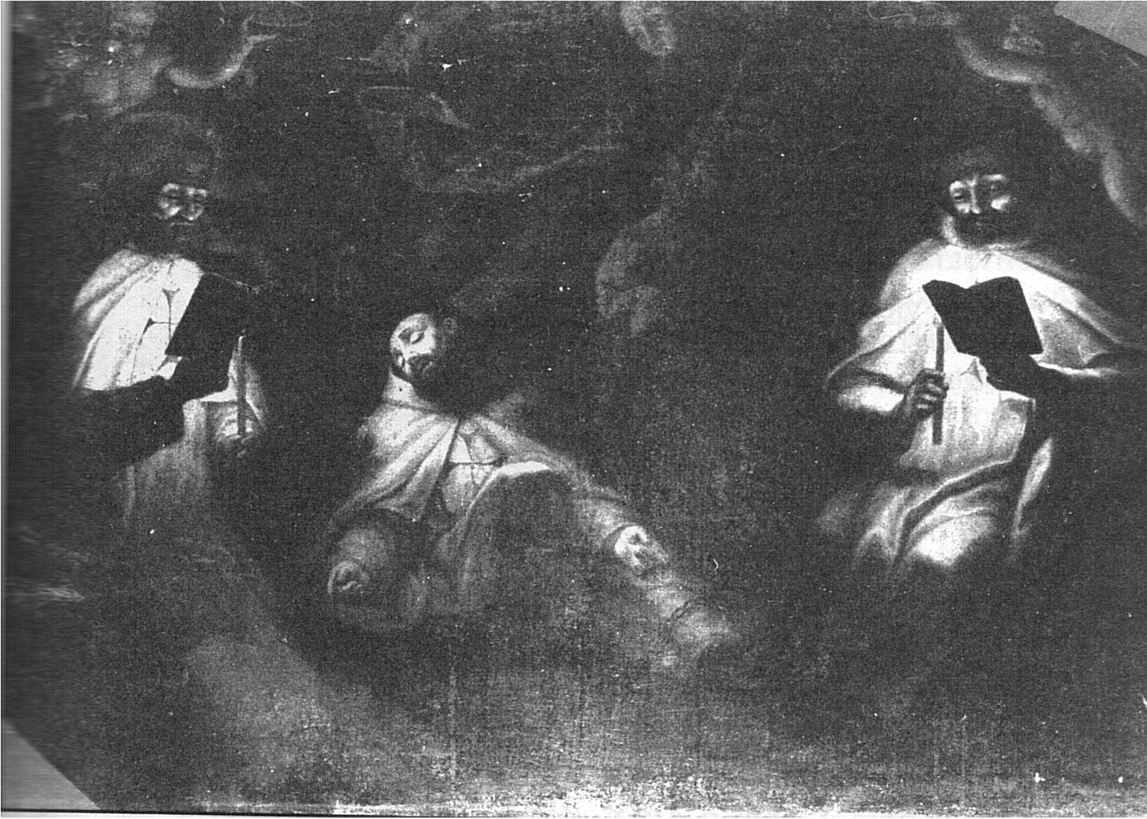 Mártires de Árgel en las mazmorras